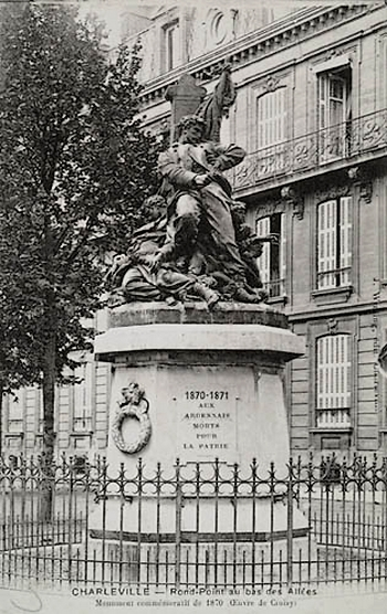 Monument aux Morts de la guerre de 1870 (Monument des Ardennais, ou Monument commémoratif de 1870, ou L’Invasion) à Charleville-Mézières (Ardennes). Inauguré en 1874, détruit par les allemands en 1918. Sculpteur Aristide Croisy.